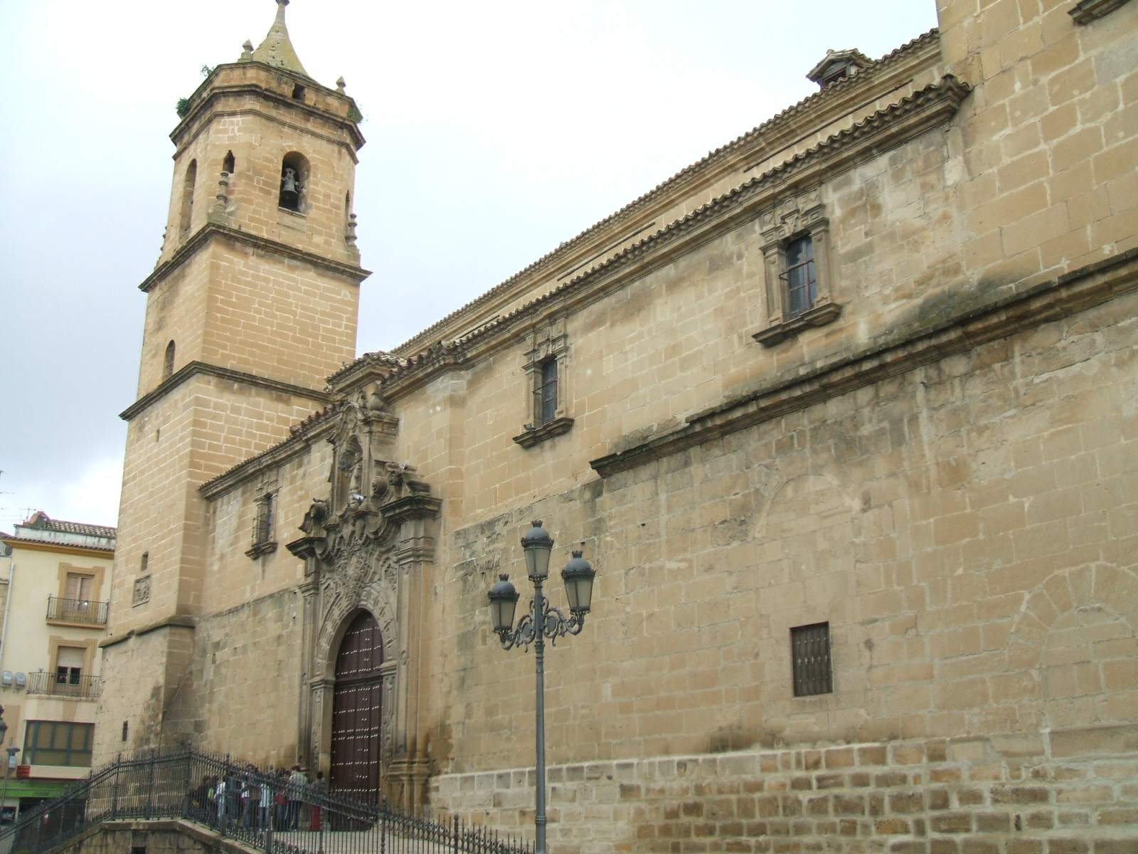 Iglesia y ex Convento de la Santísima Trinidad (Úbeda)